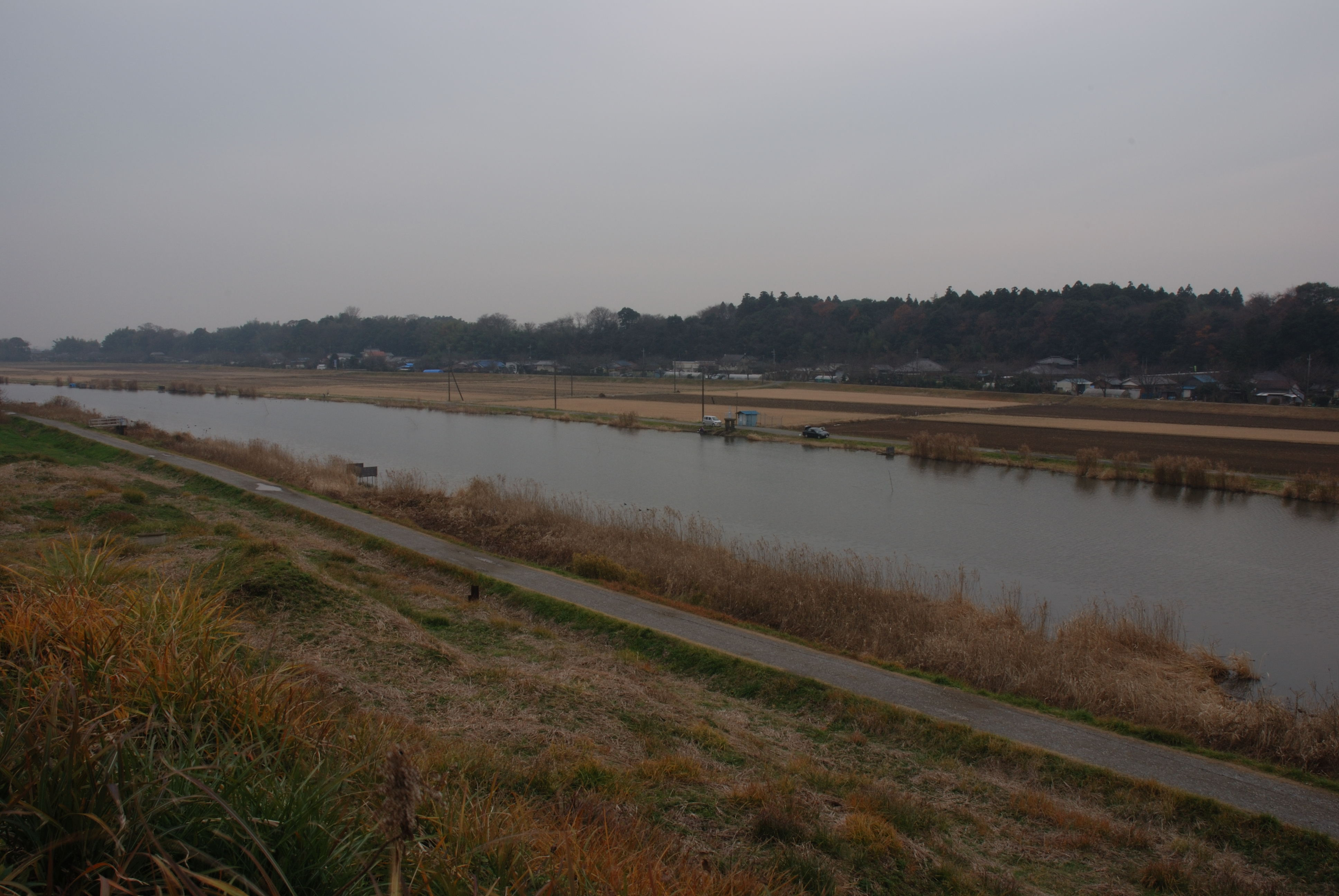 Torinji castle